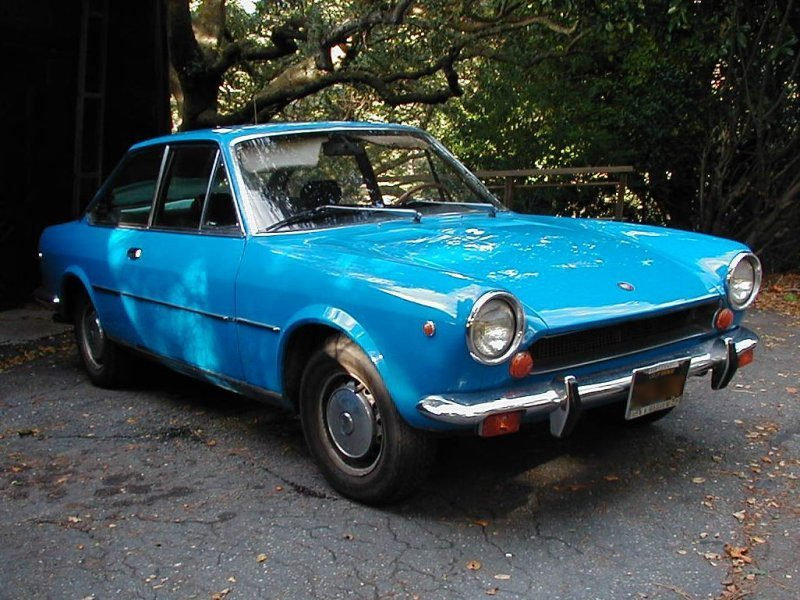 Fiat 124 Sport Coupé 1ª serie (1967-1969)